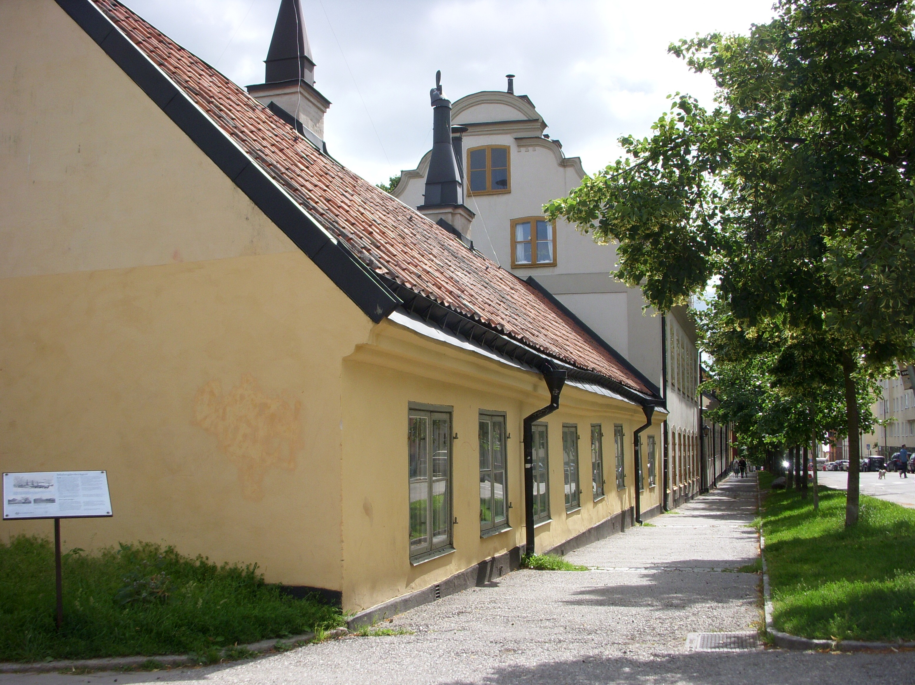 Malmgårdsvägen 55B (närmast) och 55C (det höga huset) med "längan" på Södermalm, Stockholm